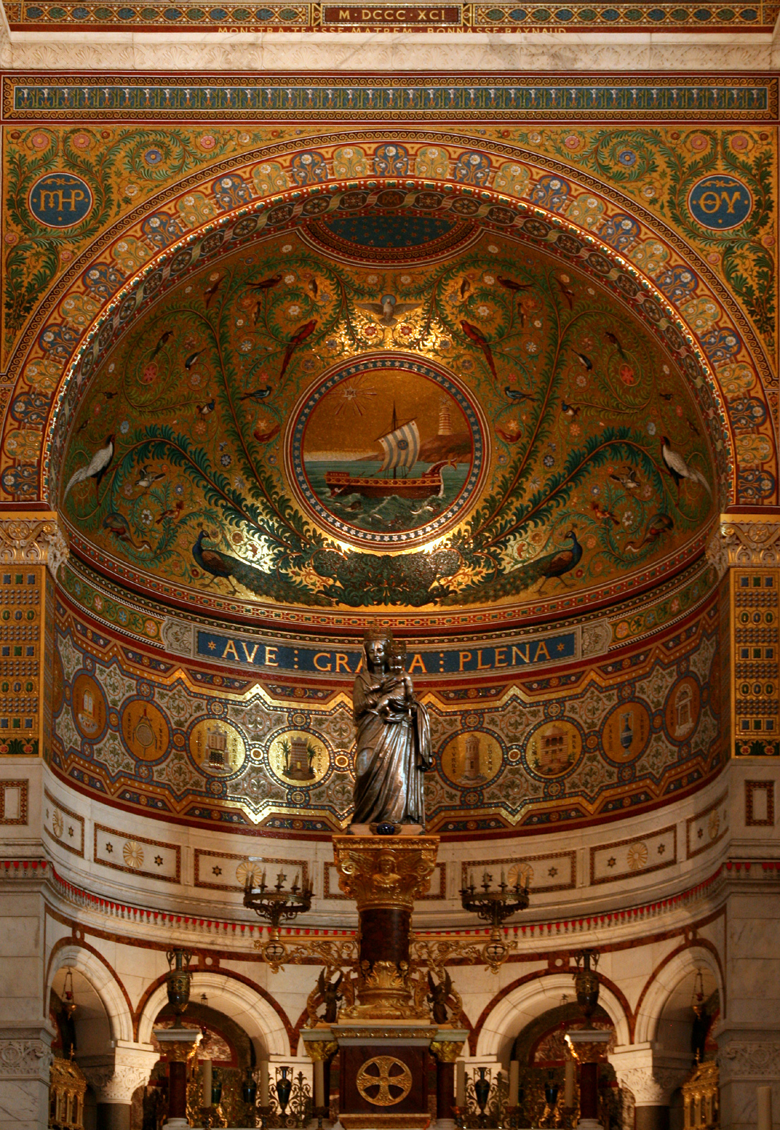 Notre Dame de la Garde à Marseille